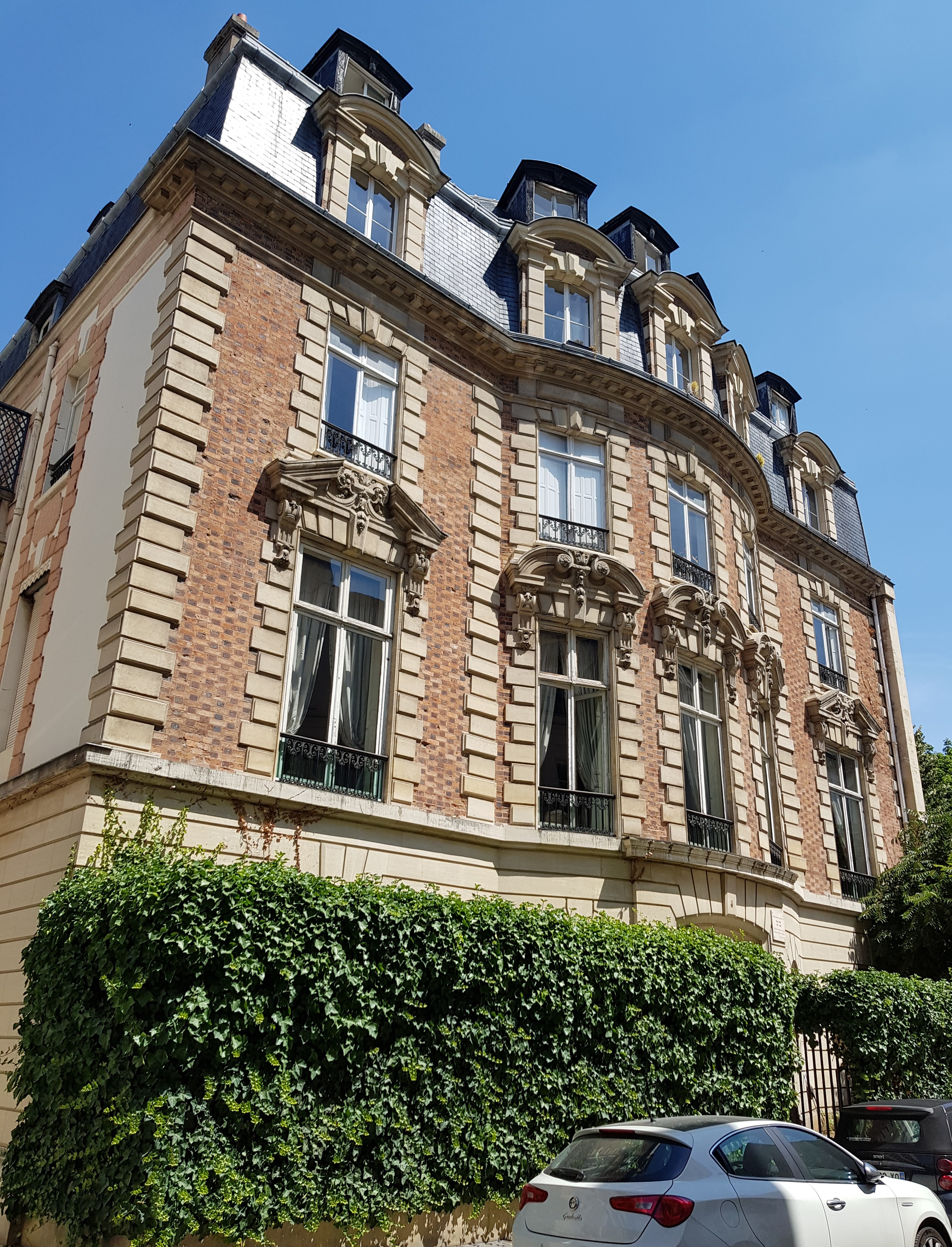 4, rue de Chanaleilles, Paris 7e.